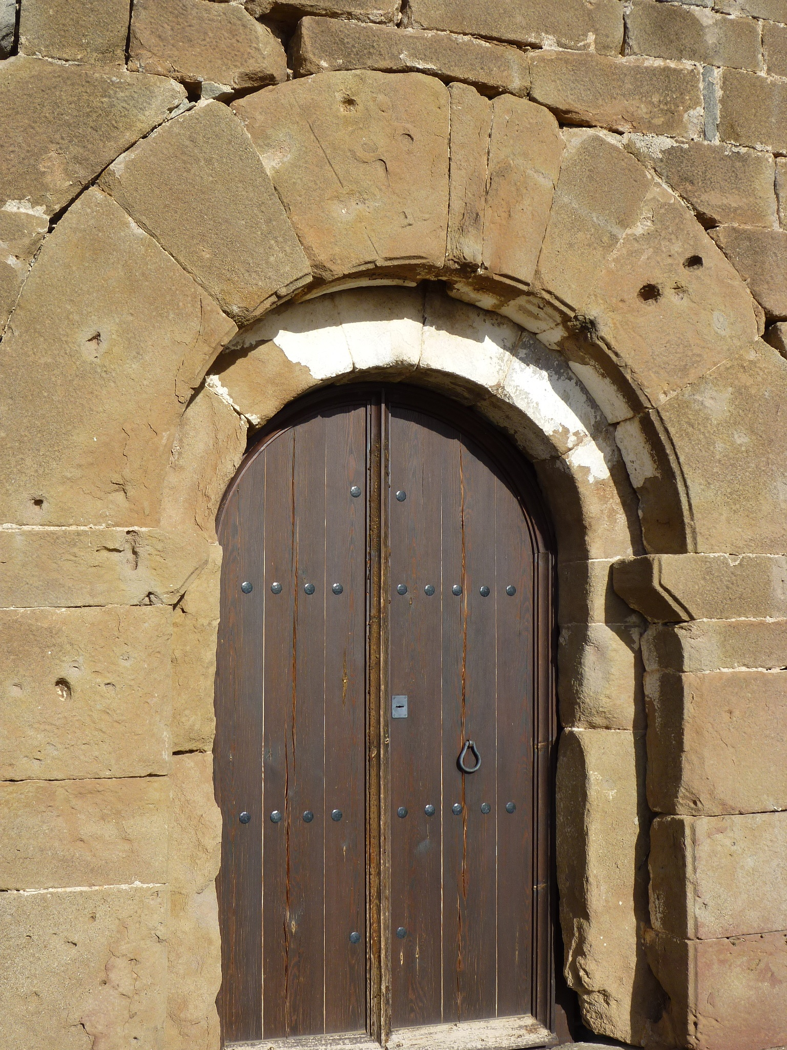 Sant Miquel del Soler de Dalt (Odèn): Portal